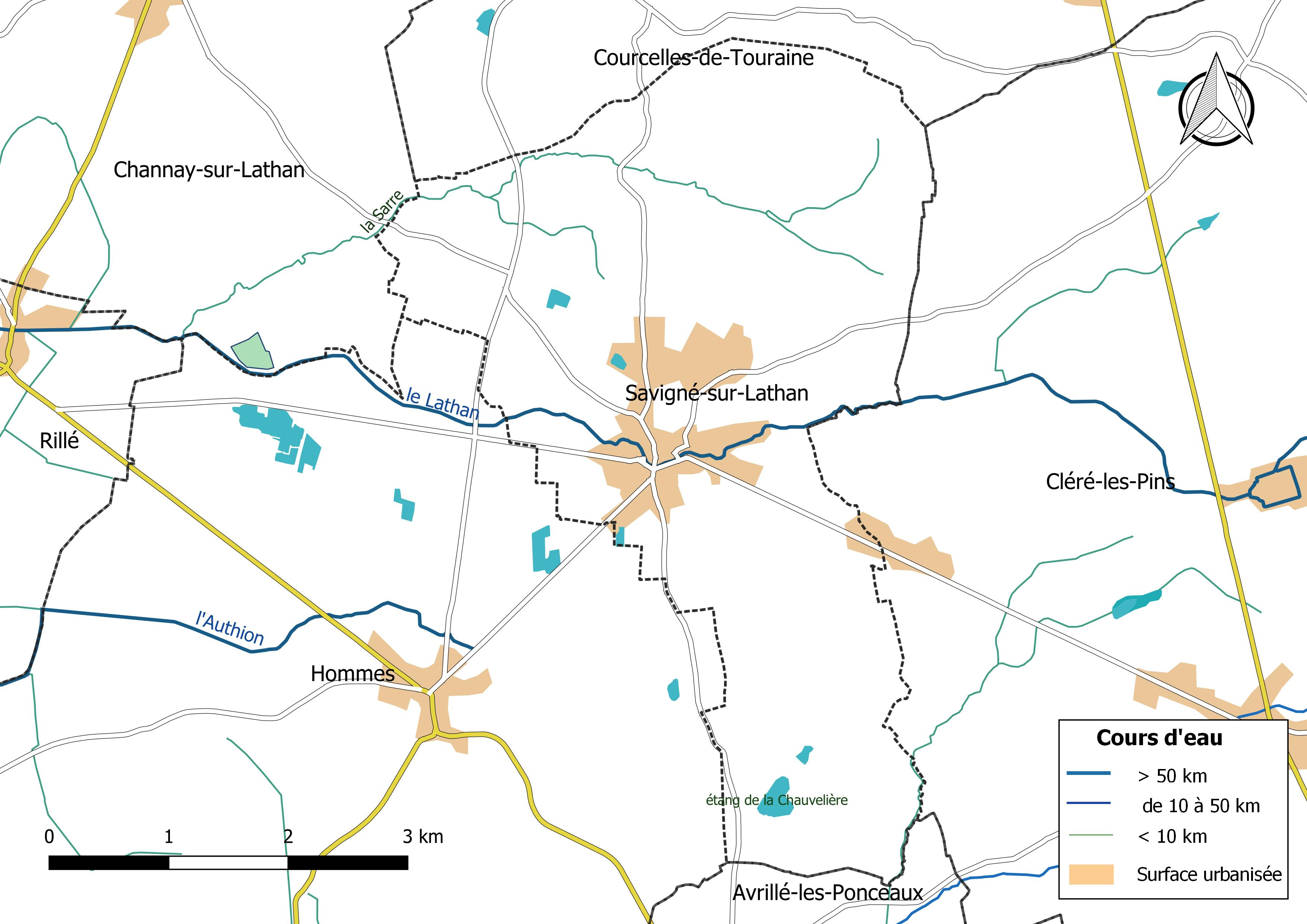 Carte du réseau hydrographique de la commune de Savigné-sur-Lathan (France).